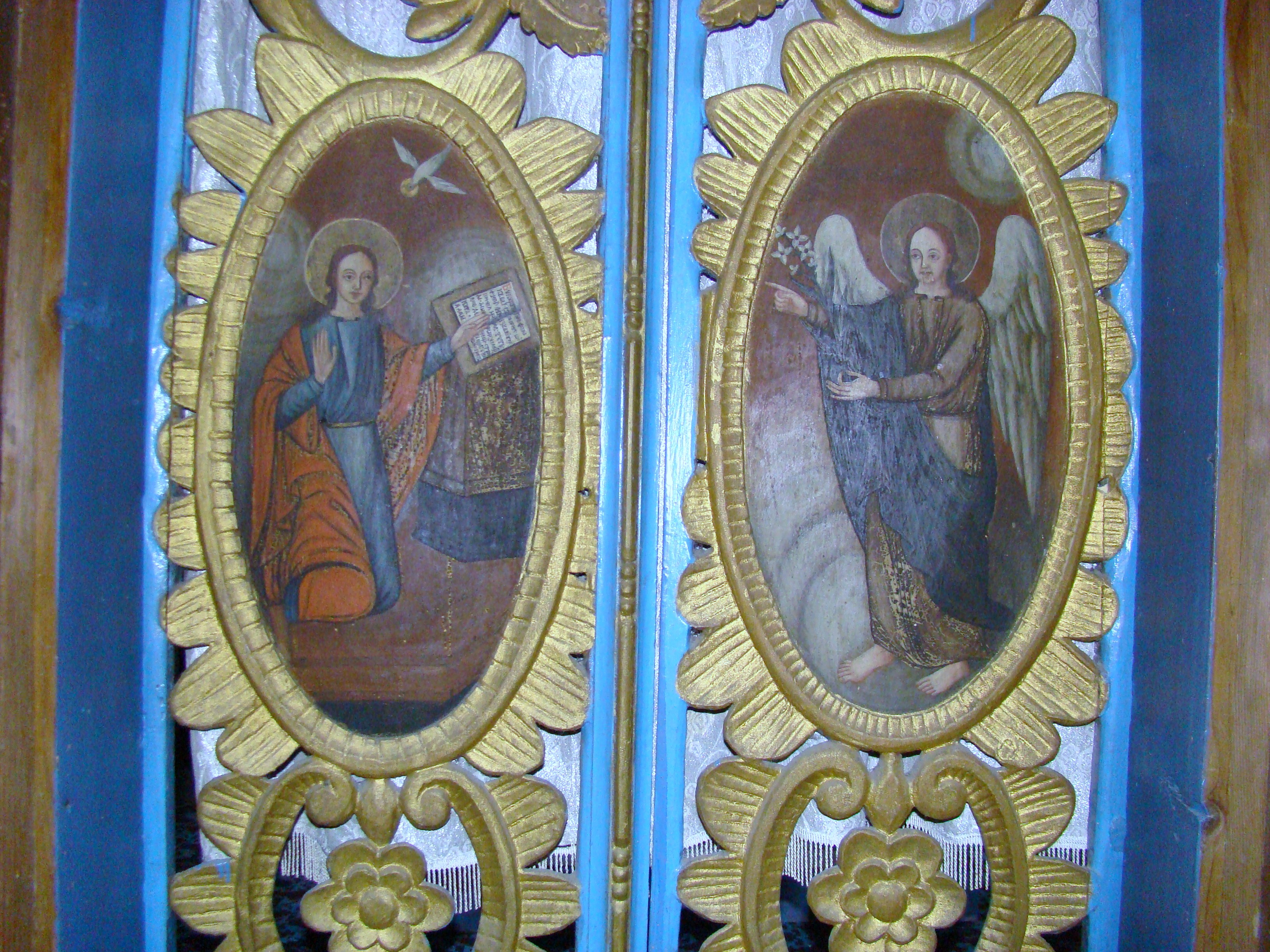 Biserica de lemn din Bucuroaia, județul Bihor